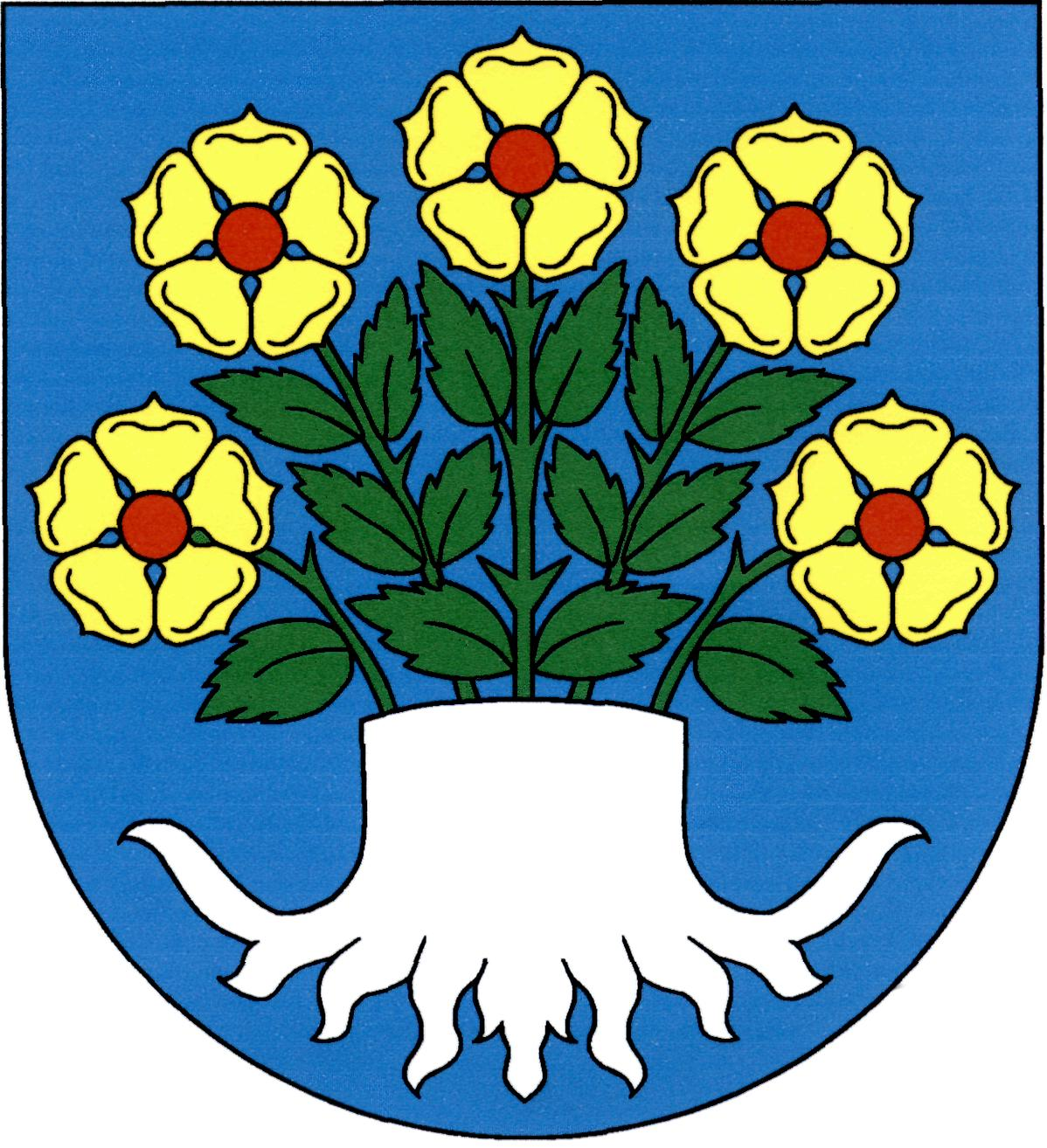 Znak obce Blažejov